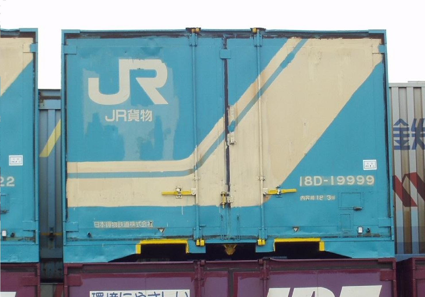 撮影地＝【大阪(タ)】